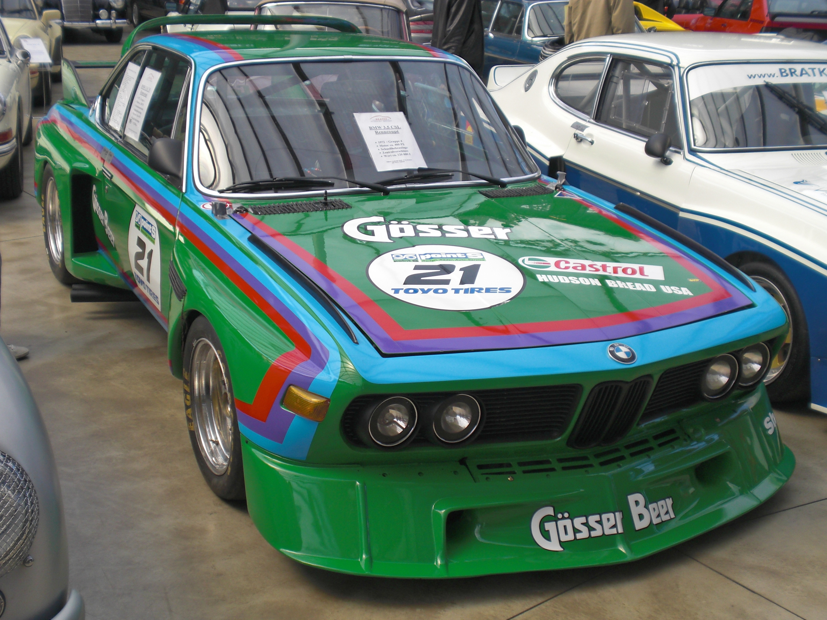 BMW 3.5 CSI Coupé Gruppe 4, 1972